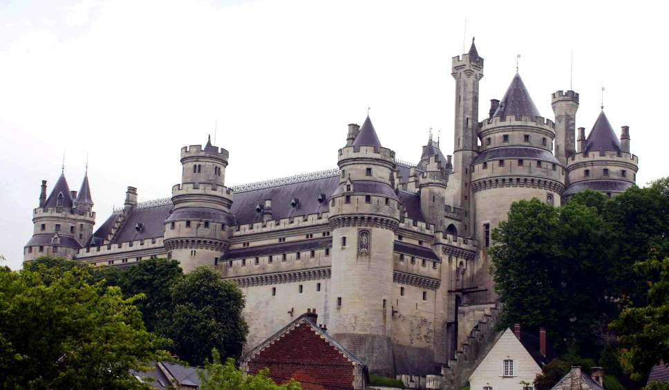 Schlass vu Pierrefonds.